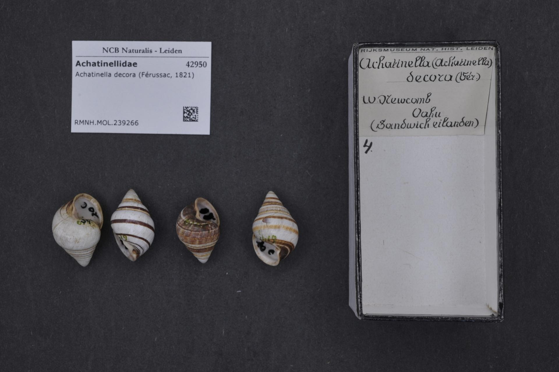 Achatinella decora (Férussac, 1821)